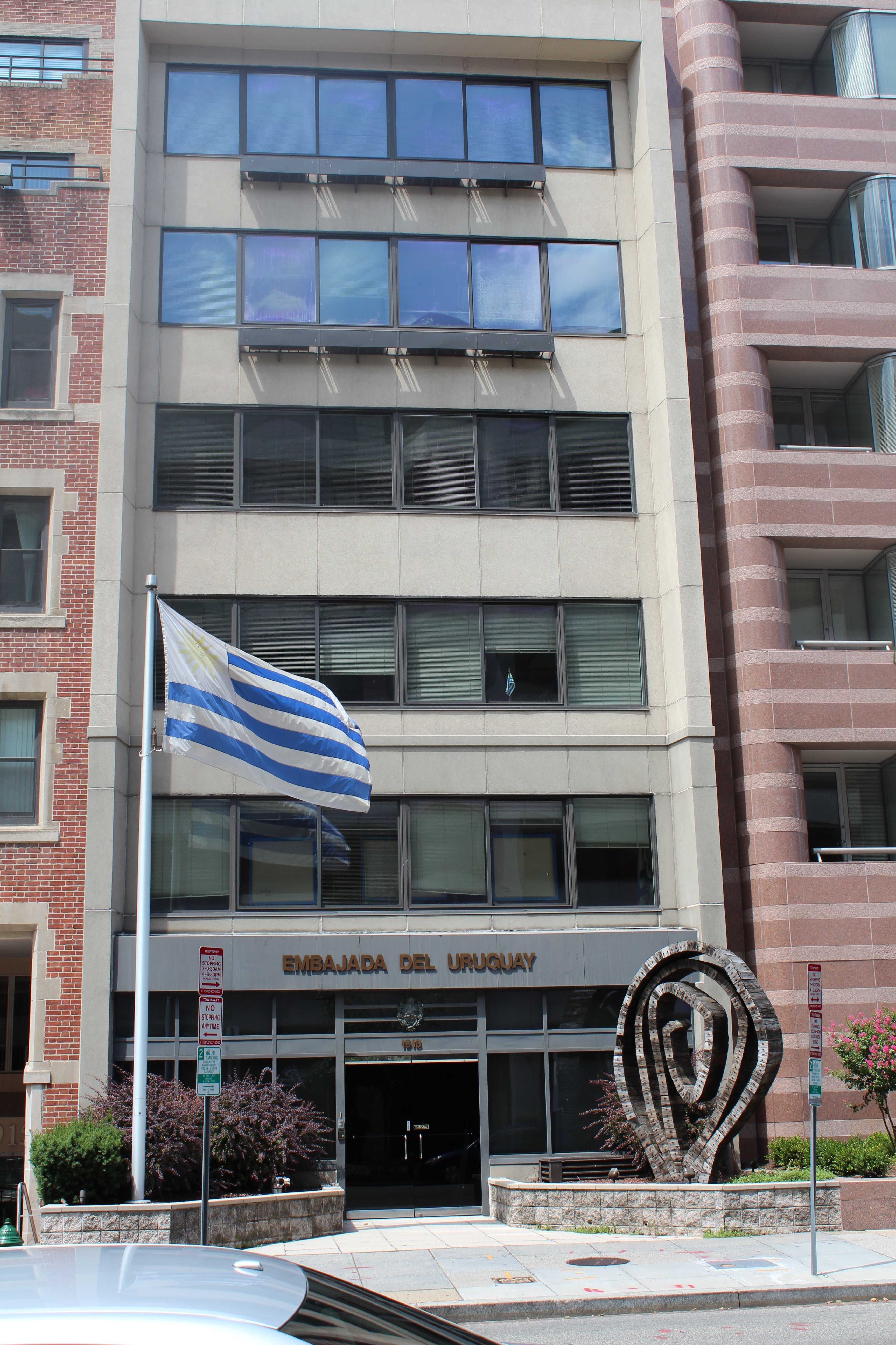 Urugvaja ambasadejo en Usono.